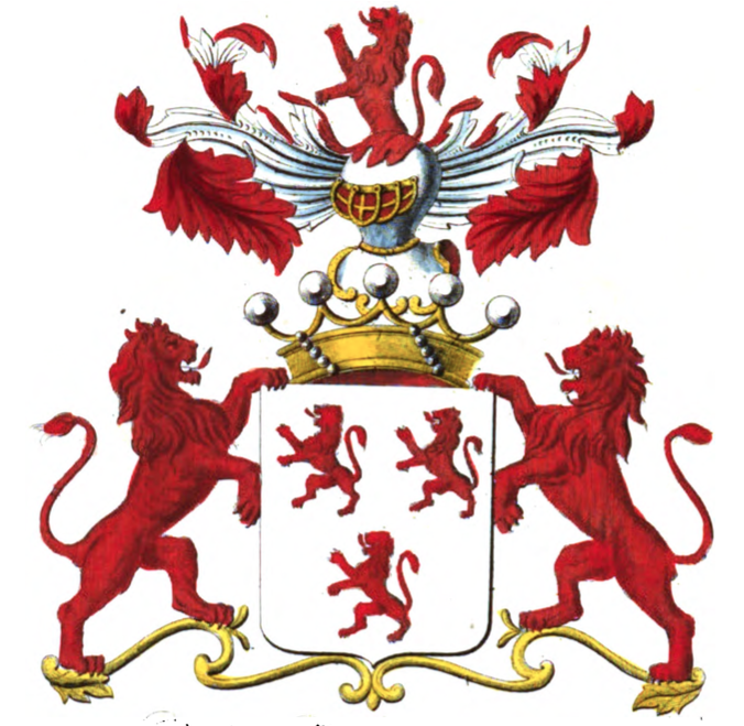 Armoiries de la famille van der Beken Pasteel